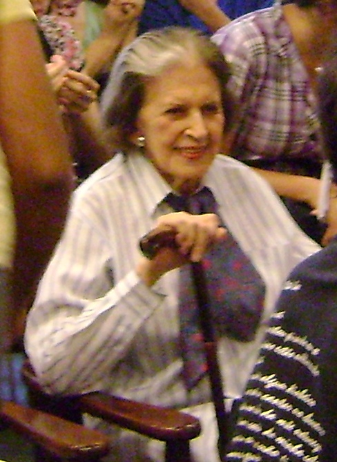 Lygia Fagundes Telles, escritora brasileira, durante a Balada Literária em que foi homenageada, na Livraria da Vila, em São Paulo.